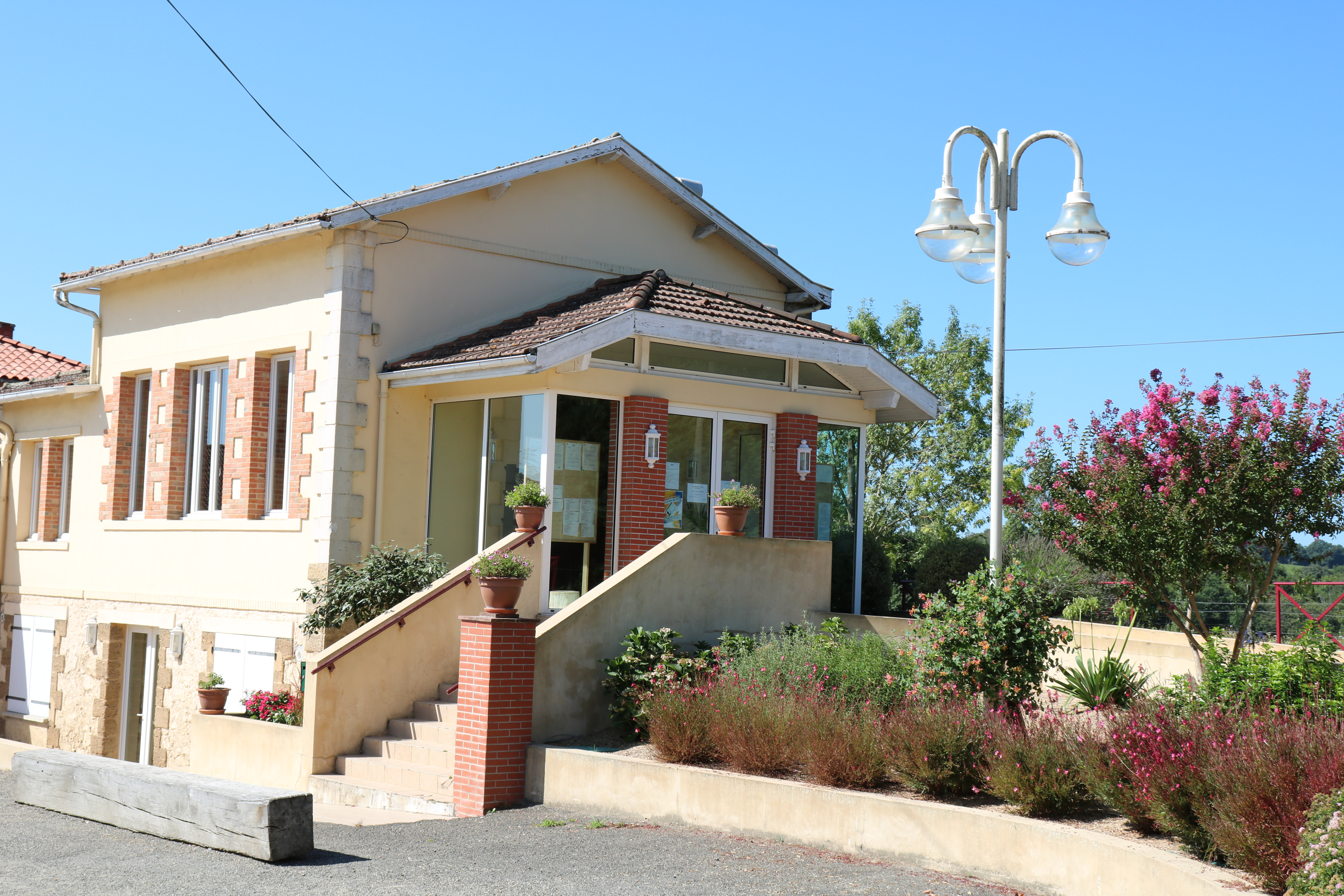 Mairie de URGOSSE (France - Région OCCITANIE - Département du GERS)